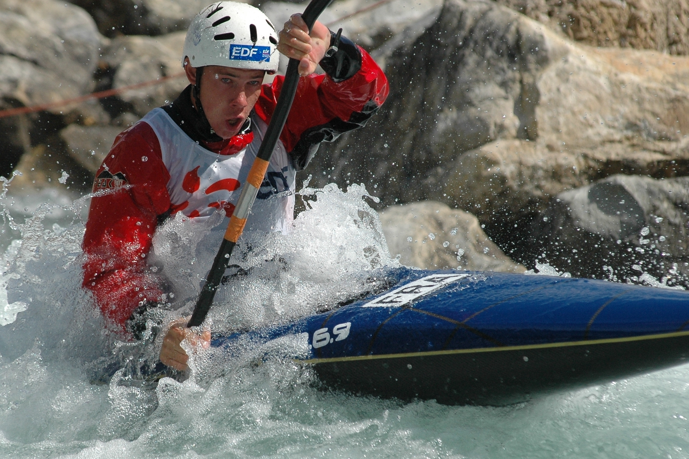 Championnats de France 2005, demi-finale sur la partie internationale